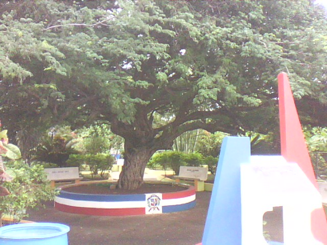 Monumento del Arbol Histórico del Guatapaná en Sabana Buey